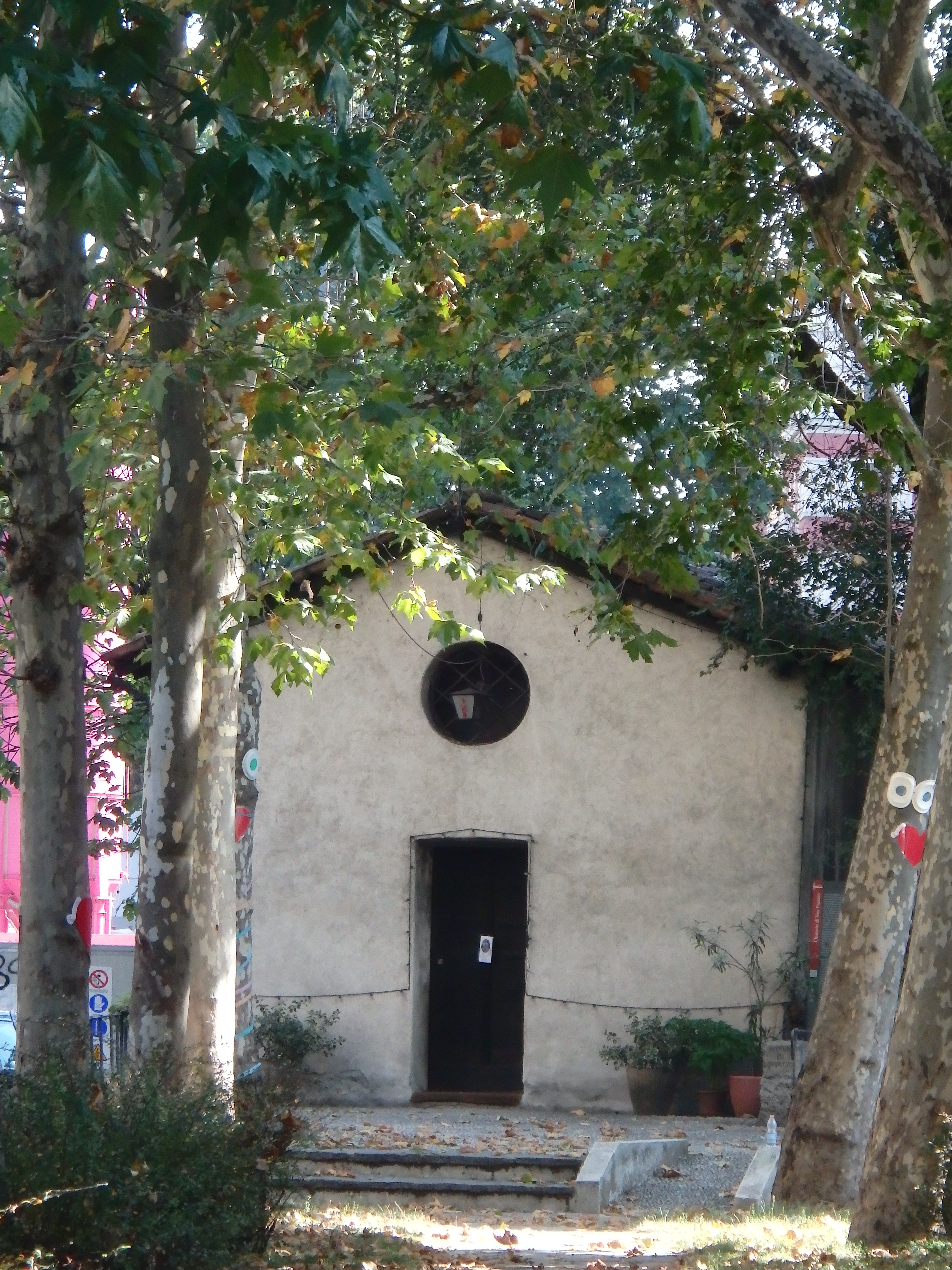 Chiesetta di via Lorenteggio